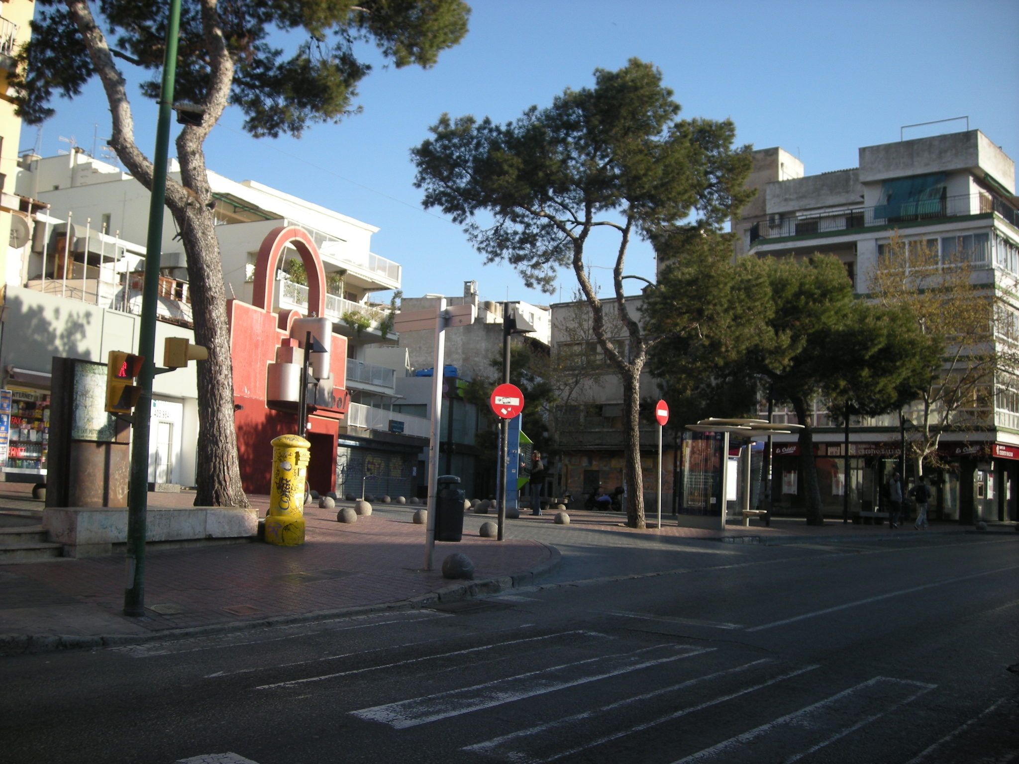 Plaça Gomila. Palma. Mallorca